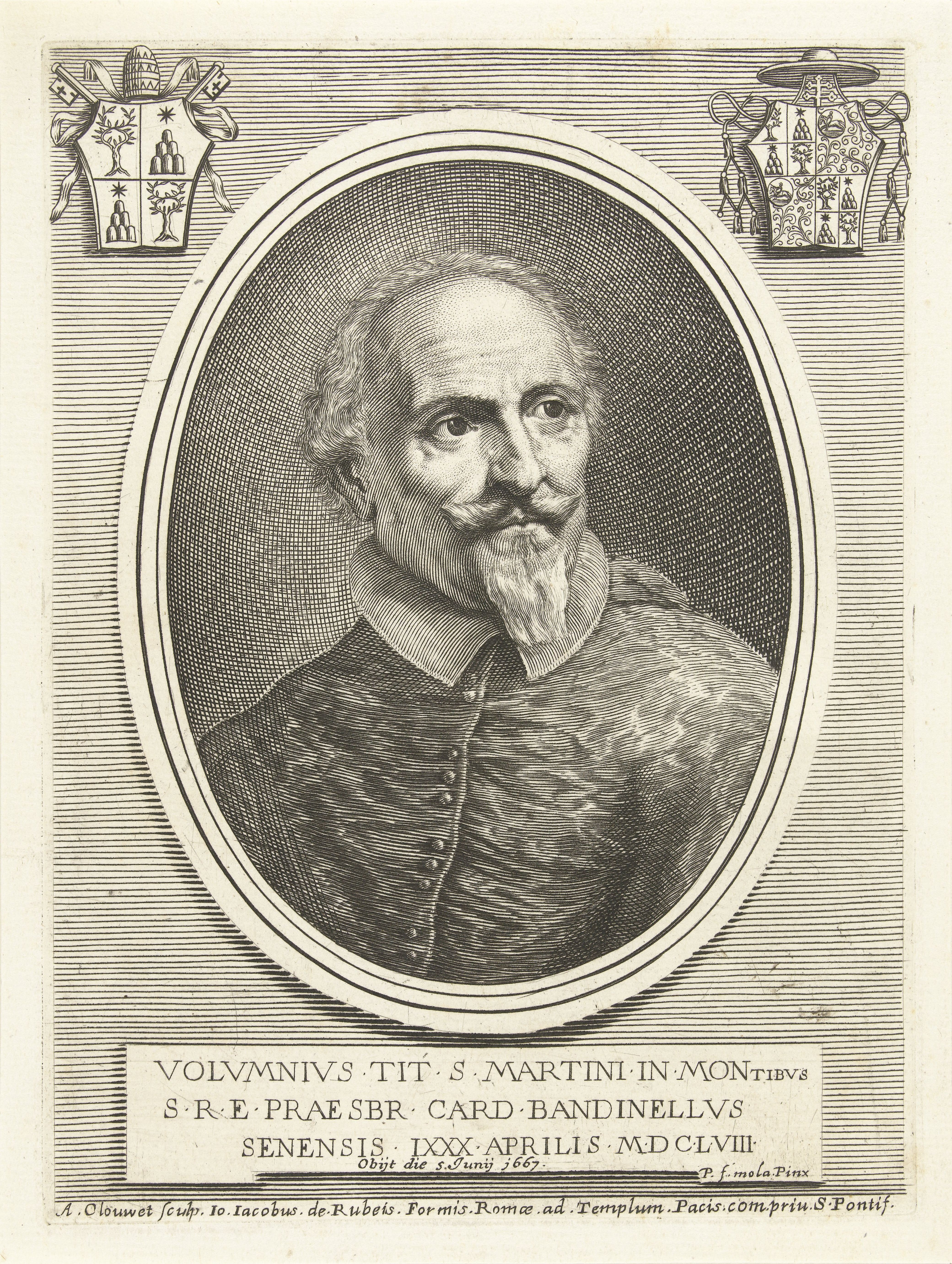 IdentificatieTitel(s): Portret van kardinaal Volumnio BandinelliEffigies Cardinalium nunc viventium (serietitel)Objecttype: prent Objectnummer: RP-P-1909-4369Catalogusreferentie: Singer 4784Hollstein Dutch 8Opschriften / Merken: verzamelaarsmerk, verso midden, gestempeld: Lugt 2228Omschrijving: Portret in ovale lijst van kardinaal Volumnio Bandinelli. Buste naar rechts. Bovenaan links het wapen van paus Alexander VII, bovenaan rechts het wapen van kardinaal Volumnio Bandinelli. De prent heeft een Latijns onderschrift met gegevens over de geportretteerde.VervaardigingVervaardiger: prentmaker: Albertus Clouwet (vermeld op object)naar schilderij van: Pier Francesco Mola (vermeld op object)uitgever: Giovanni Giacomo de'Rossi (vermeld op object)Plaats vervaardiging: RomeDatering: 1667 - 1679Fysieke kenmerken: gravureMateriaal: papier Techniek: graveren (drukprocedé)Afmetingen: plaatrand: h 193 mm × b 144 mmToelichtingdeel van een serie met als titel "Effigies Cardinalium nunc viventum". De serie bestaat uit portretten van kardinalen.OnderwerpWie: Volumnio BandinelliVerwerving en rechtenVerwerving: aankoop 1905Copyright: Publiek domein